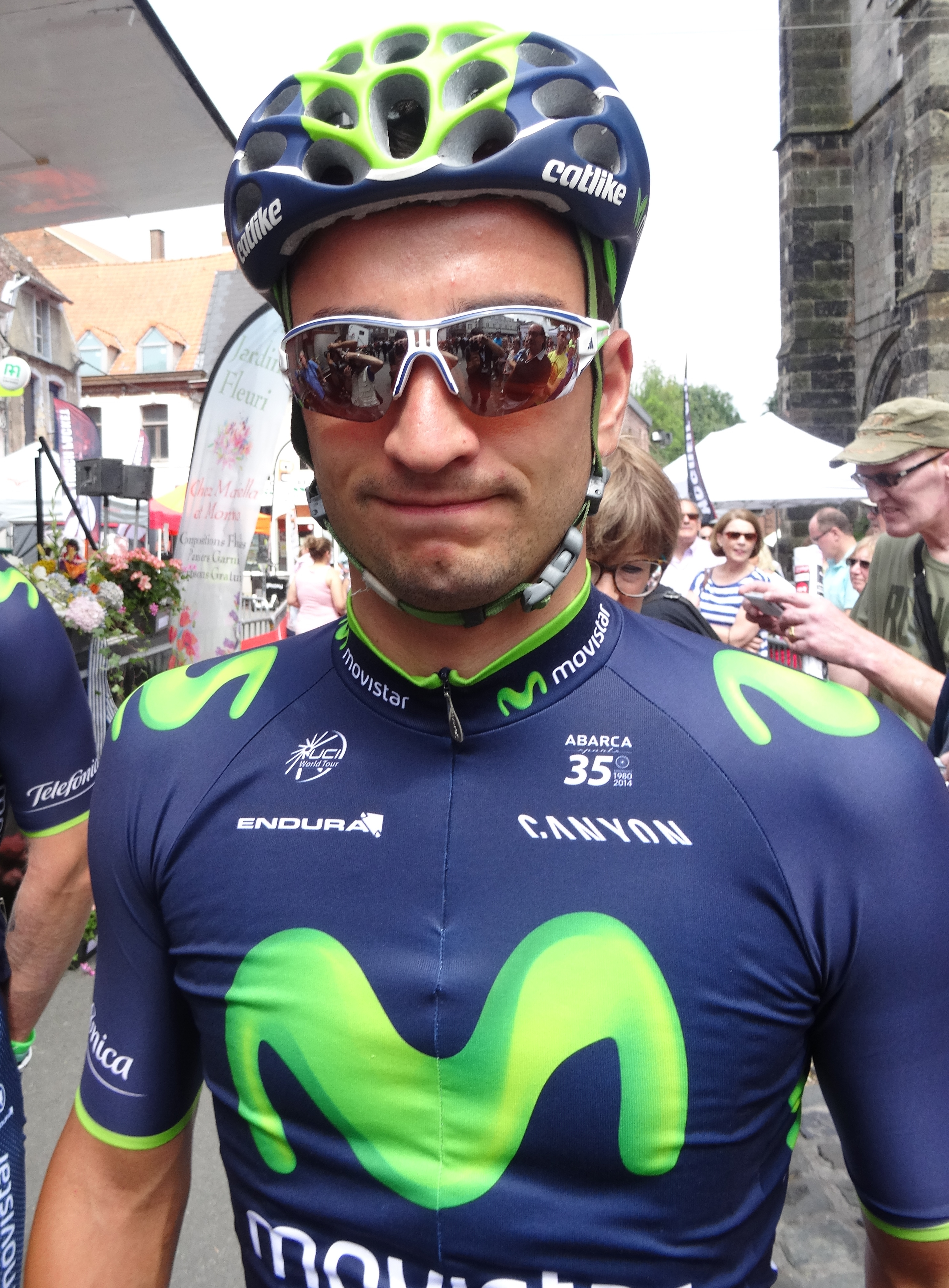 Reportage photographique réalisé le samedi 26 juillet à l'occasion du départ de la première étape du Tour de Wallonie 2014 à Frasnes-lez-Anvaing, Belgique.